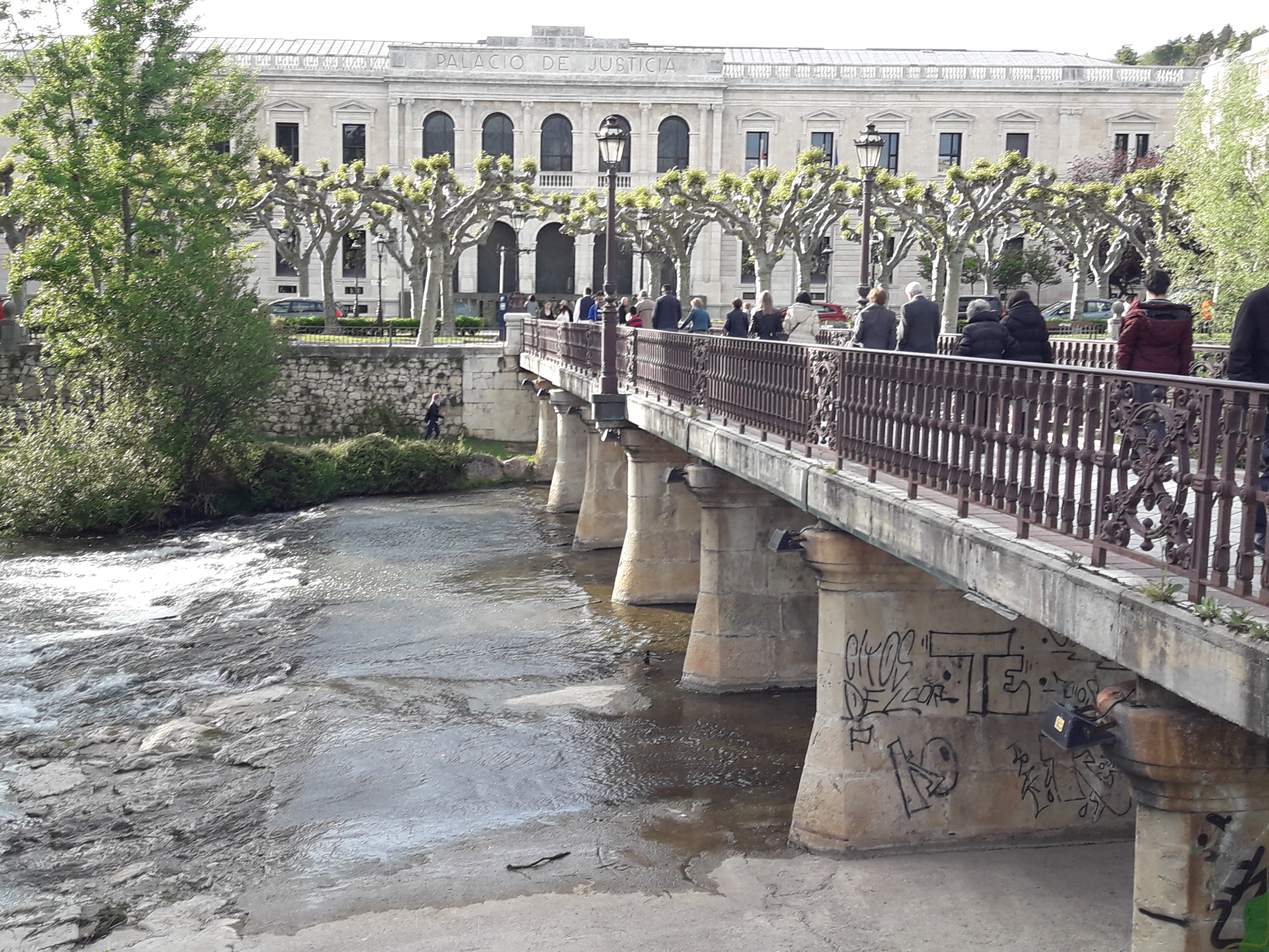 Palacio de Justicia de Burgos, primer plano del puente Besson sobre el Arlanzón